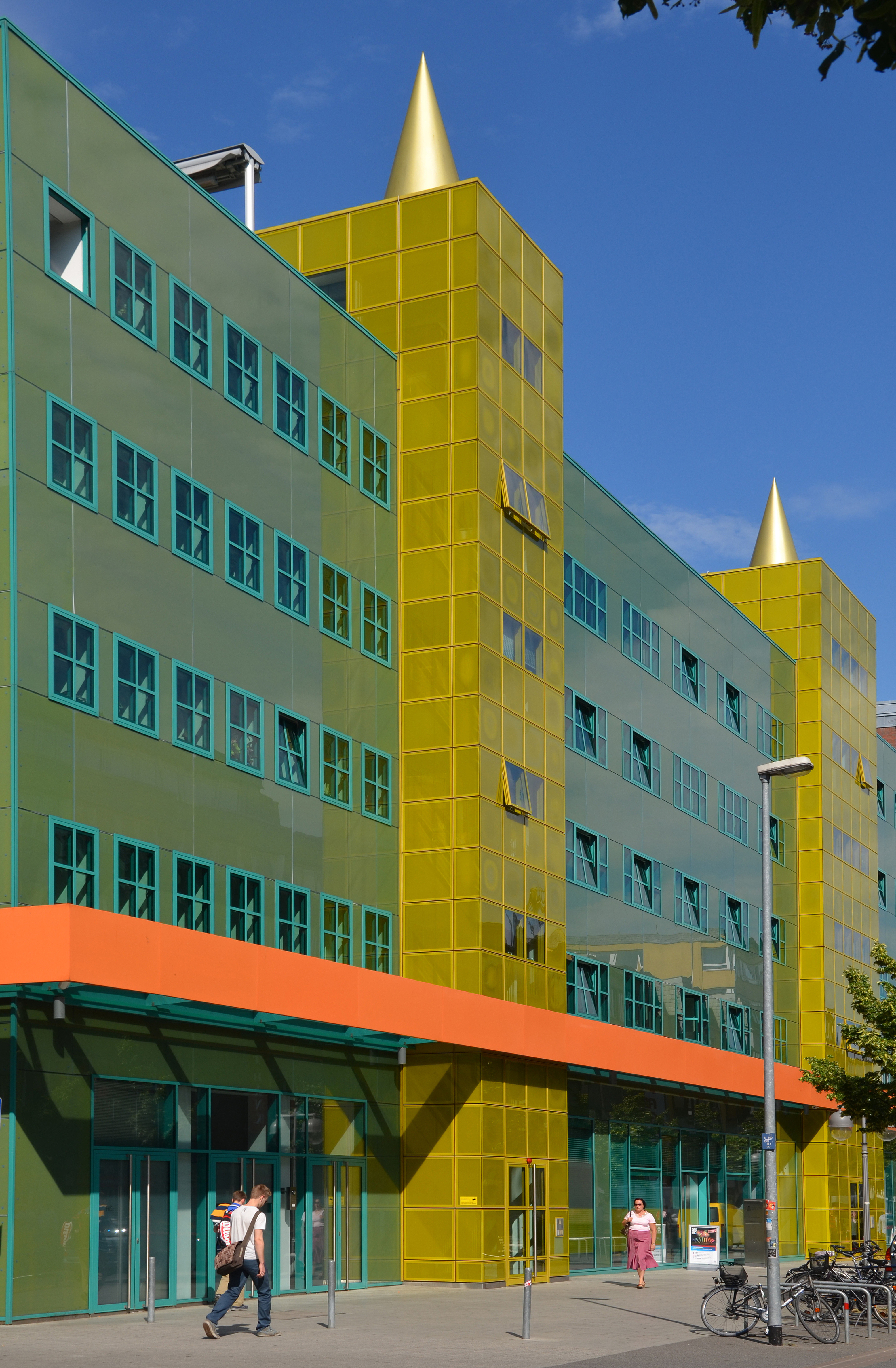 Das Mendini-Haus in Hannover mit seiner großteil halb-transparenten Glasfassade in türkisgrün und gelb vorgesetzten Treppenrisaliten umfasst ältere, sanierte Gebäude an der Straße Lange Laube Ecke Stiftstraße in Hannover. Die von Madsack an die Architektenbrüder Allessandro und Francesco Mendini in Auftrag gegebene Gestaltung ist Teil des Medienzentrums mit dem Anzeiger-Hochhaus ...